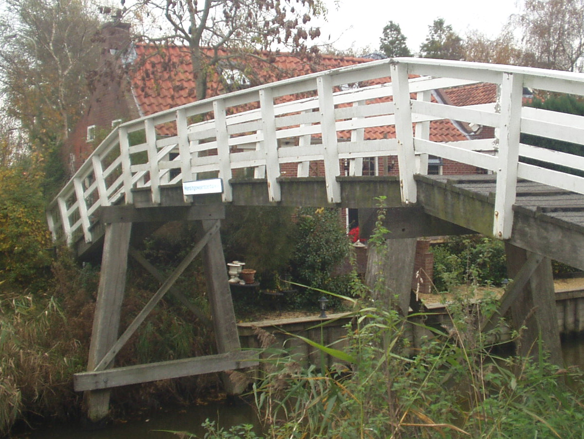 Hoogholtje en Mensingeweer. Nedersaksies: Hoogholtje in Mìnskeweer.